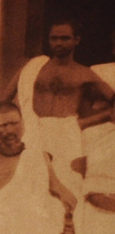 Bharatha Vilasam Sabha - AD 1909 Vallathol Narayana Menon